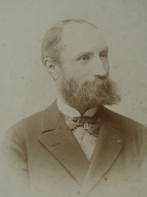 Gabriel Alapetite, haut fonctionnaire et diplomate français